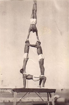 Akrobatische Pyramide von vier Männern im Kriegsgefangenenlager 380 in Ägypten im oder nach dem II. Weltkrieg; bislang nicht identifizierte Zirkustruppe